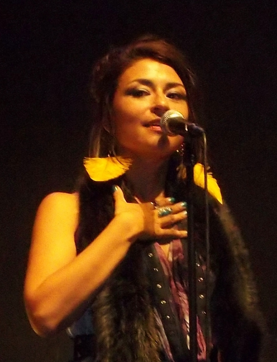 Elisapie Isaac en spectacle à Montréal lors de la 21e édition du festival Présence autochtone à la Place des festivals le vendredi 5 août 2011